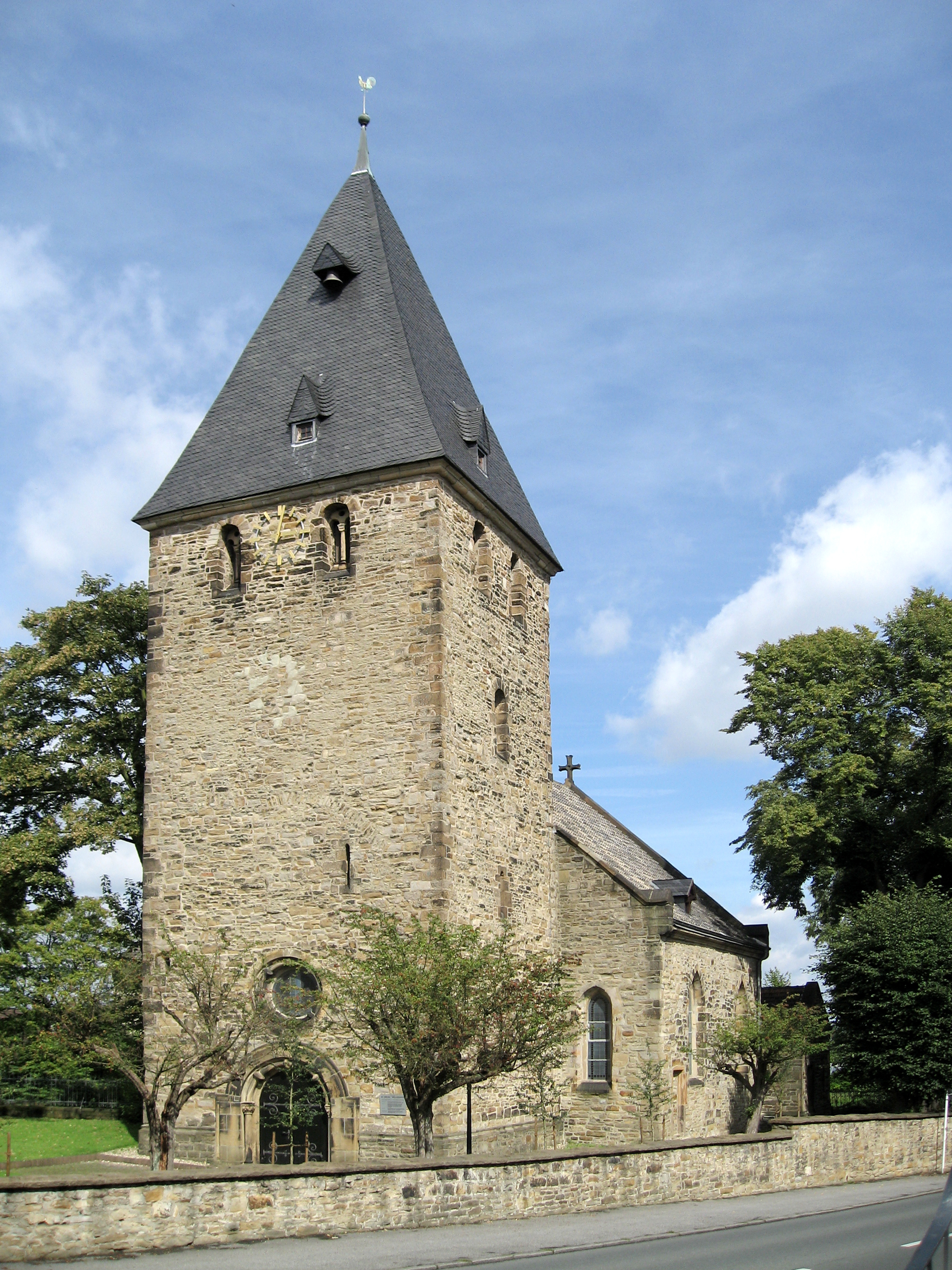 Dortmund, Wellinghofen, Alte Kirche, Südwestansich an der Overgünne im Mittelalter Rastort auf dem Pilgerweg nach Syburg Ende 12. Jh. als Kreuzsaalkirche erbaut, Westturm 14. Jh: Erweiterung zur einjochigen Hallenkirche, Apsis durch rechteckigen Chor ersetzt, der im 19. Jh neugotisch erweitert wurde 1977-79 restauriert, unter anderem der Fragmente der Bemalung